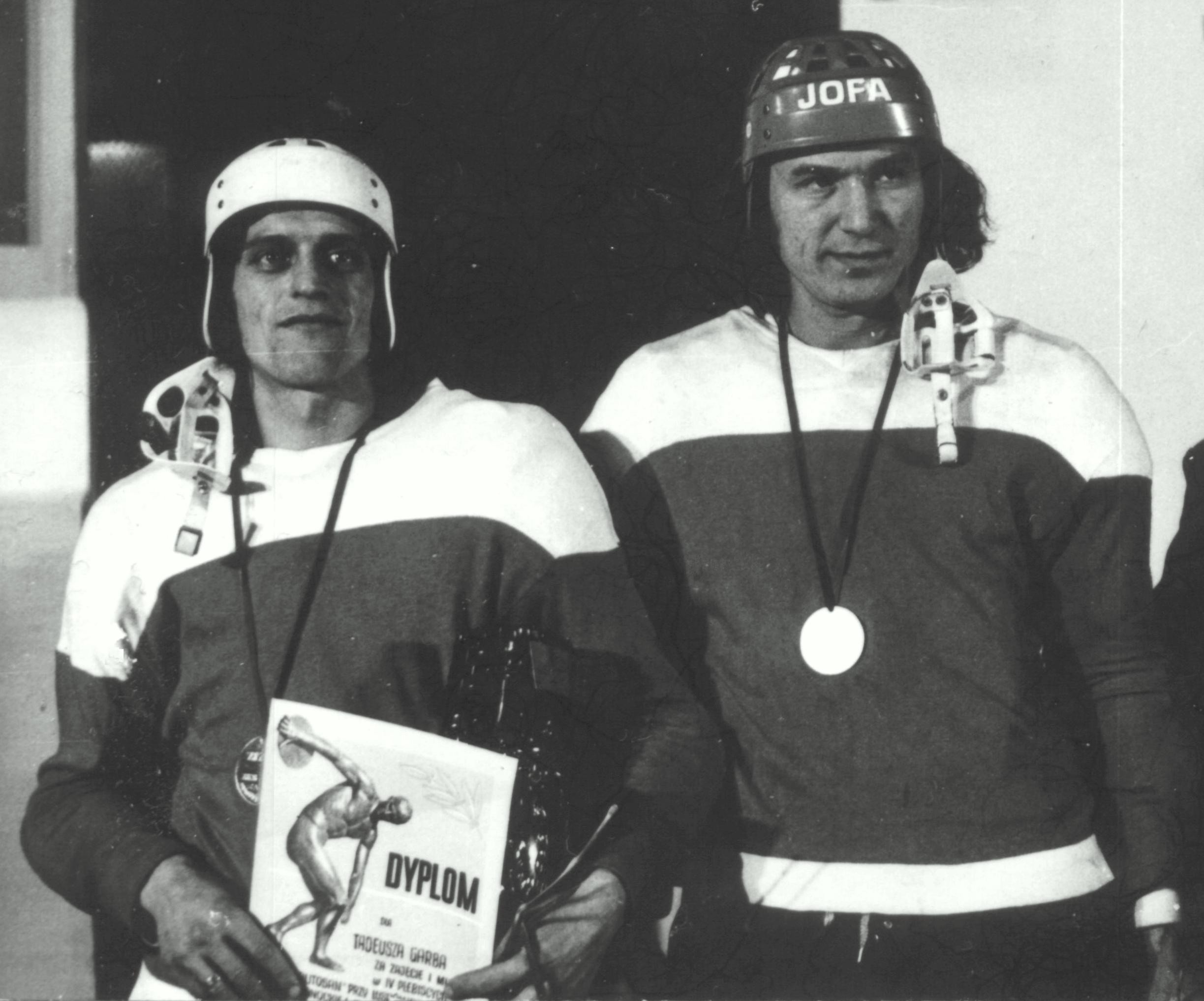 Tadeusz Garb, Jan Paszkiewicz podczas finału IV plebiscytu „Złota Dziesiątka Sportowców ZKS Stal” za rok 1975 (Torsan, 15 lutego 1976). Zdjęcie z archiwum rodzinnego.